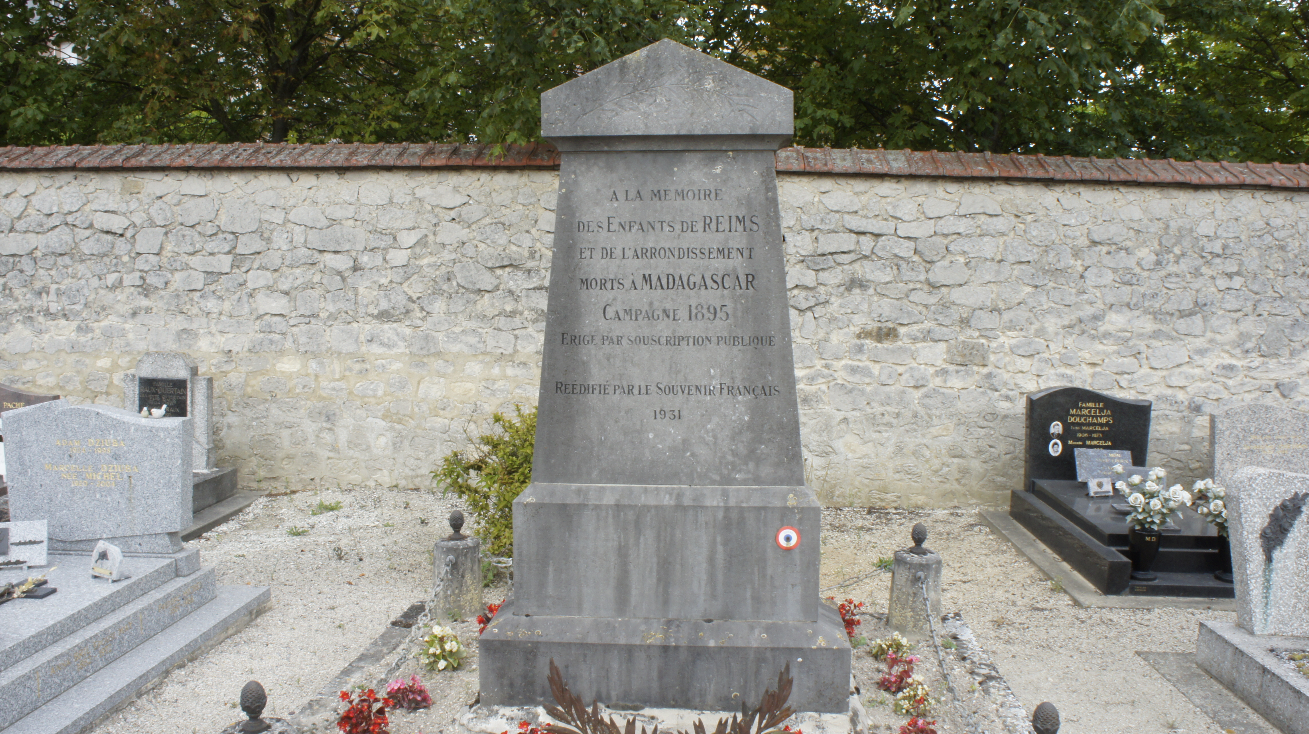 Monument en hommage aux enfants de Reims tombés lors de la campagne à Madagascar, 1895.